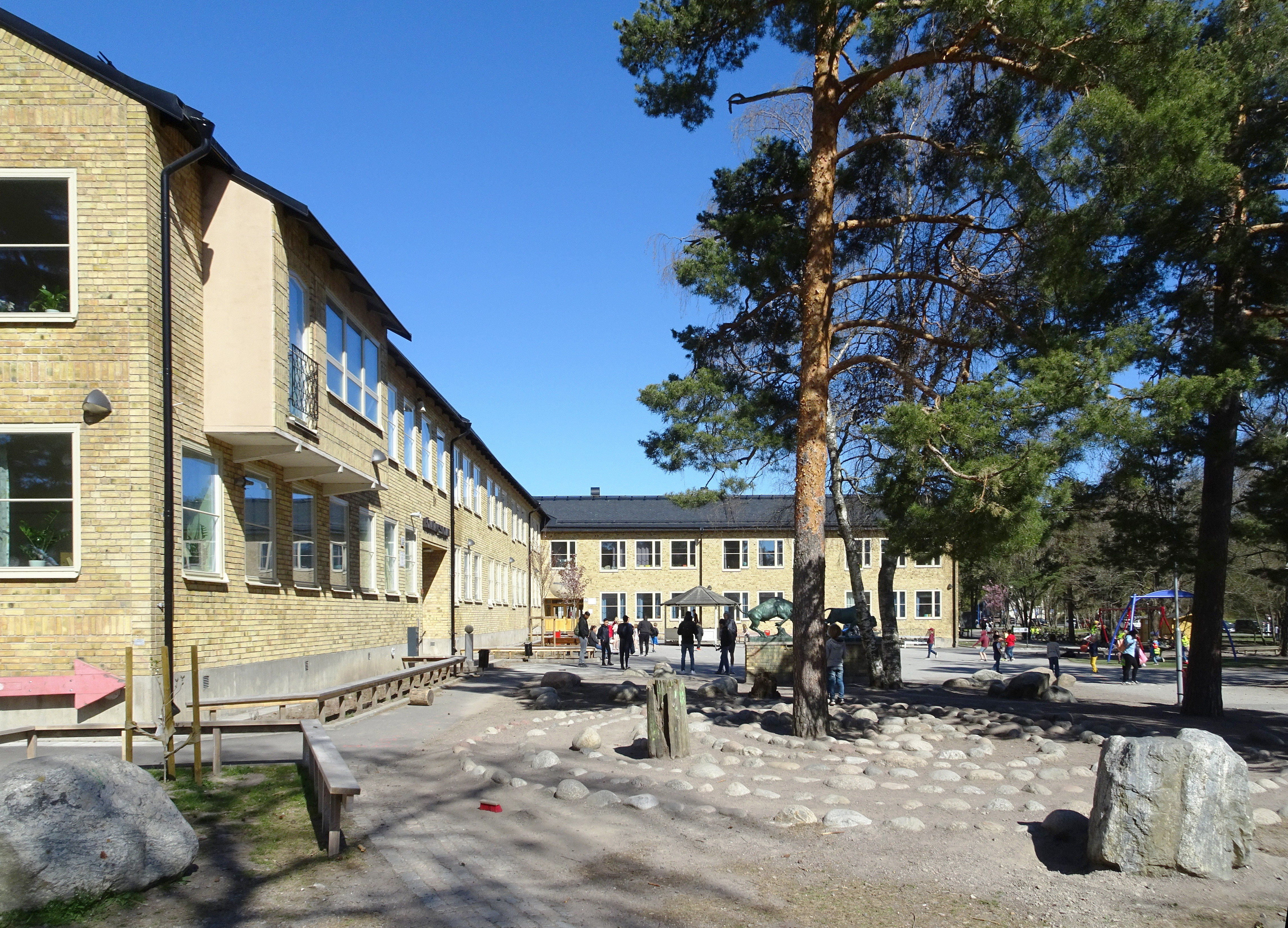 Hökarängsskolan